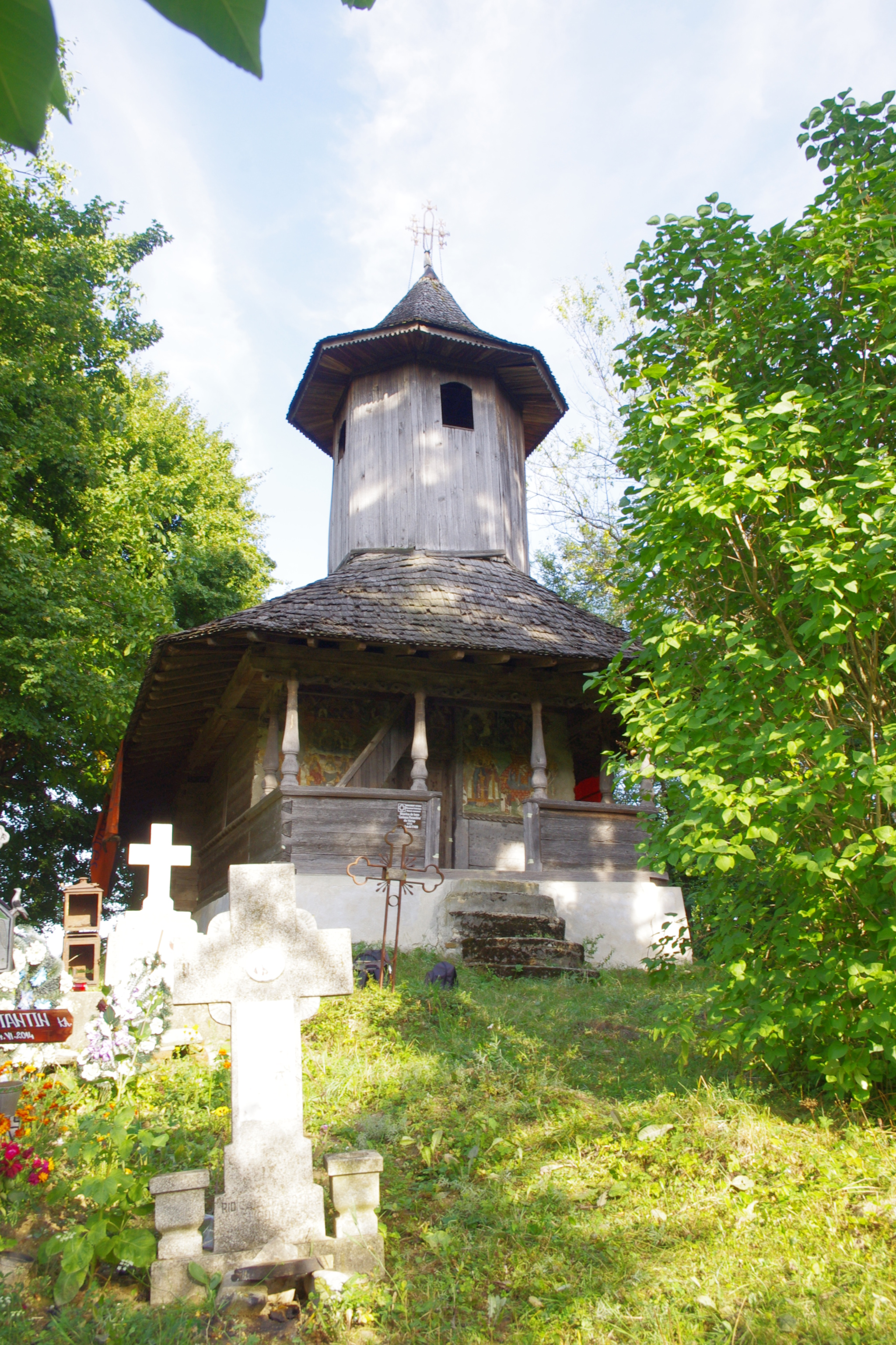 Biserică din lemn datată 1713. Realizată din lemn de stejar, resursă locală abundentă, fasonat în grinzi cu secțiune rectangulară. Grosimea medie a pereților rezultați este de 10-14 cm; îmbinările de capăt ale grinzilor rezolvate în coadă de rîndunică. Este conformată planimetric din pridvor, pronaos, naos și altar. Are turn clopotniță pe pridvor. Volumetric, naosul este puțin mai lat decît pronaosul; absida altarului este poligonală (jumătate de octogon). Cele trei spații interioare sînt boltite; bolți semicilindrice pe pronaos și naos; boltă provenită din intersecție de cilindri pe altar. Particularități: - la pridvor este realizată o decorație traforată a grinzilor; acestea reazemă pe stîlpi rotunzi. - la interior separarea celor trei spații este realizată cu ziduri de cărămidă. Pereții sînt tencuiți și pictați. - pardoseala realizată din lespezi mari de piatră de rîu. - treptele de acces realizate din pietre de moară. Se află într-o stare generală de degradare moderată datorată avariilor la fundație și a uzurii materialelor din care este construită; învelitoarea de șiță este degradată sever. În prezent nu este utilizată. Necesită intervenții de consolidare și restaurare. Septembrie 2015